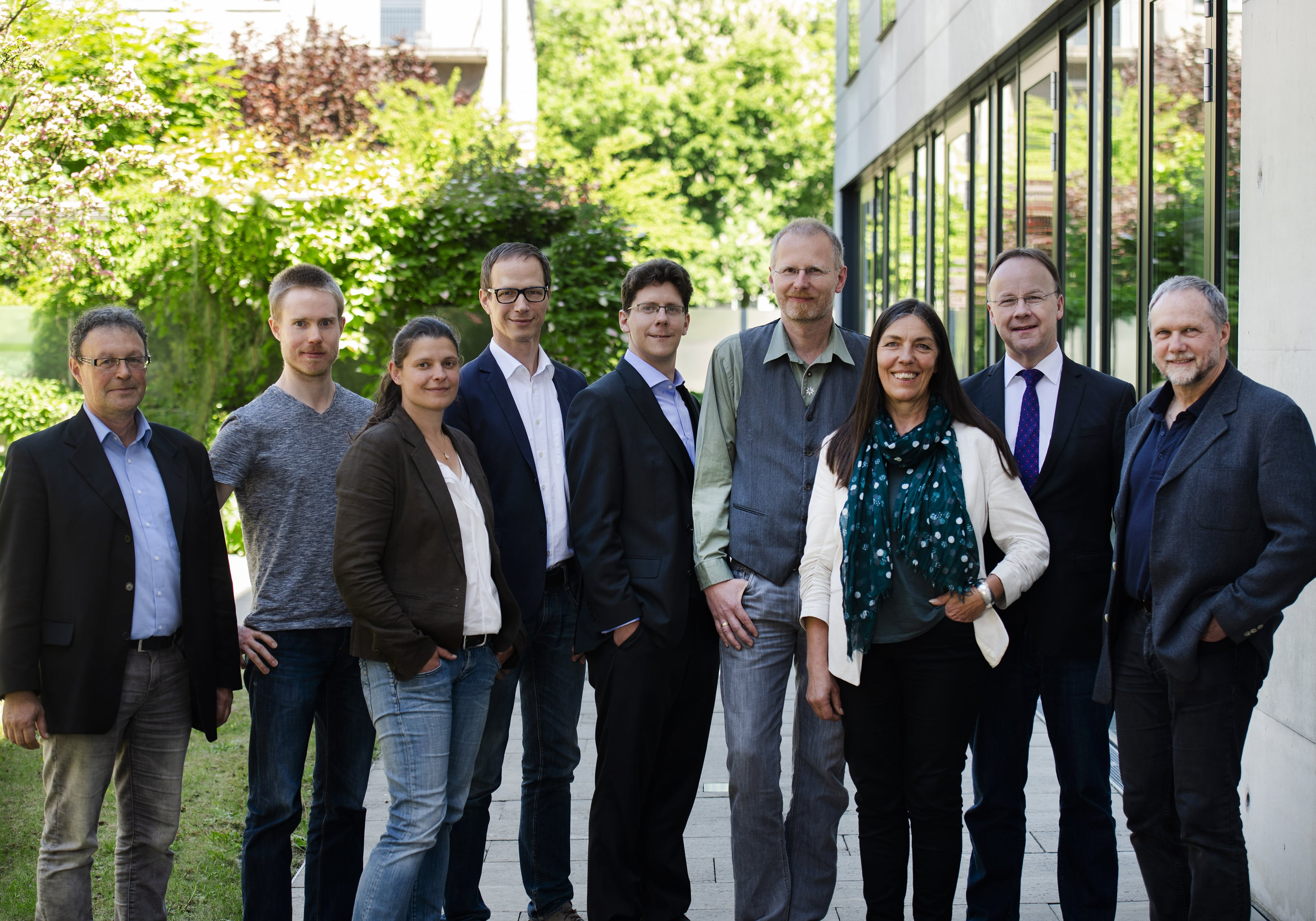 Bundesvorstand der Ökologisch-Demokratischen Partei (ÖDP) ab Mai 2018